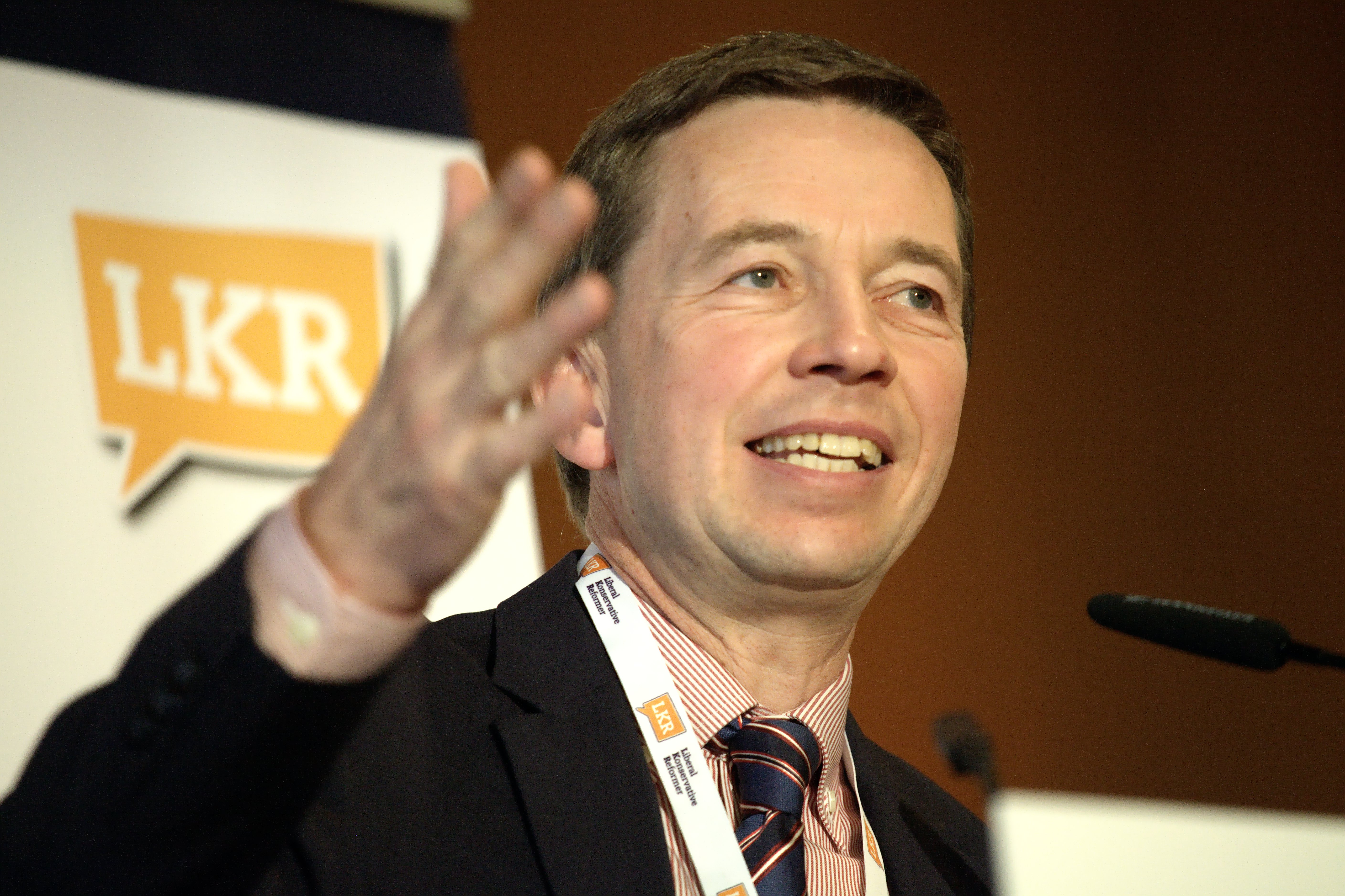 Prof. Dr. Bernd Lucke auf dem Bundesparteitag der LKR in Siegen am 11. März 2017